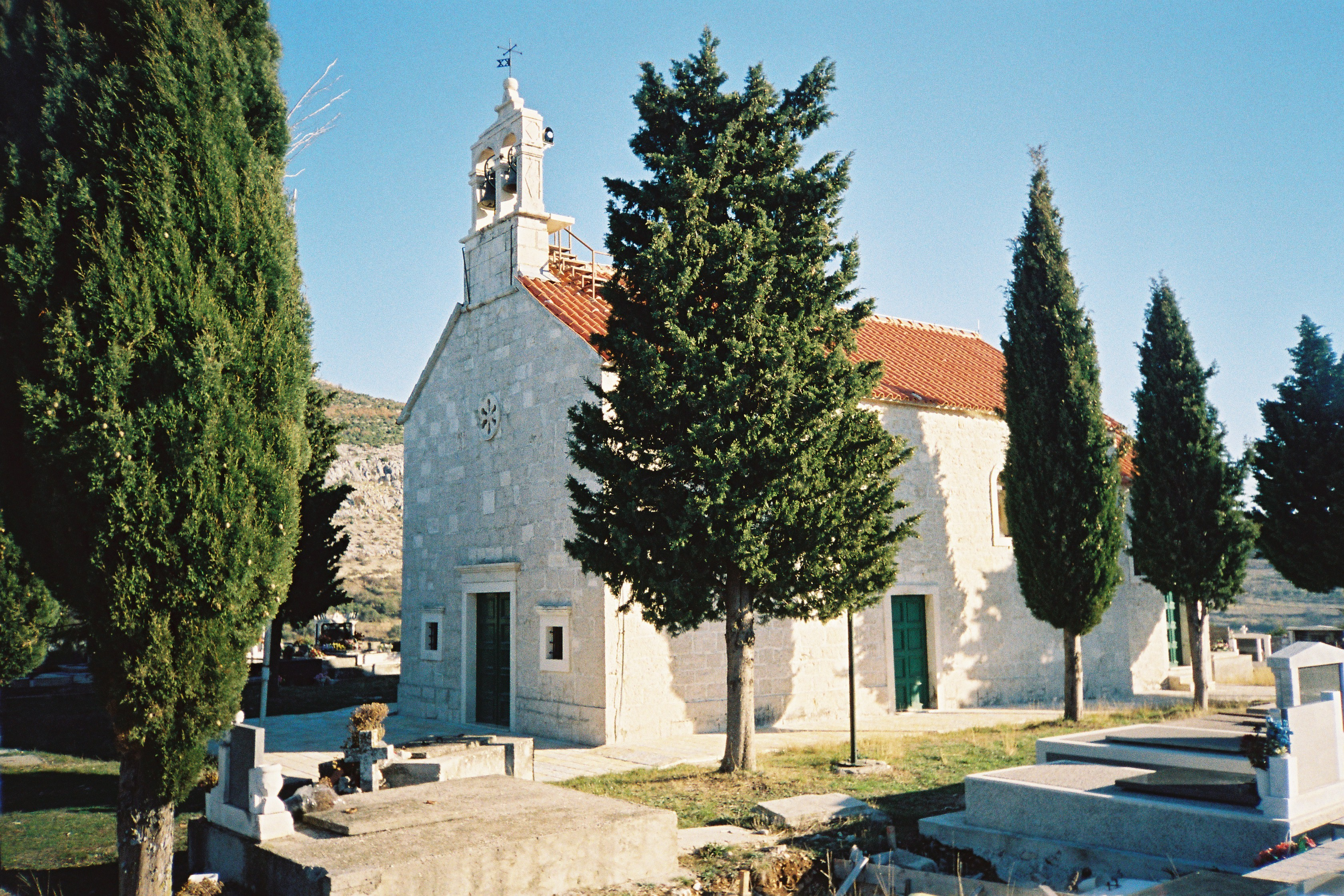 Crkva sv. Ivana u Slivnu